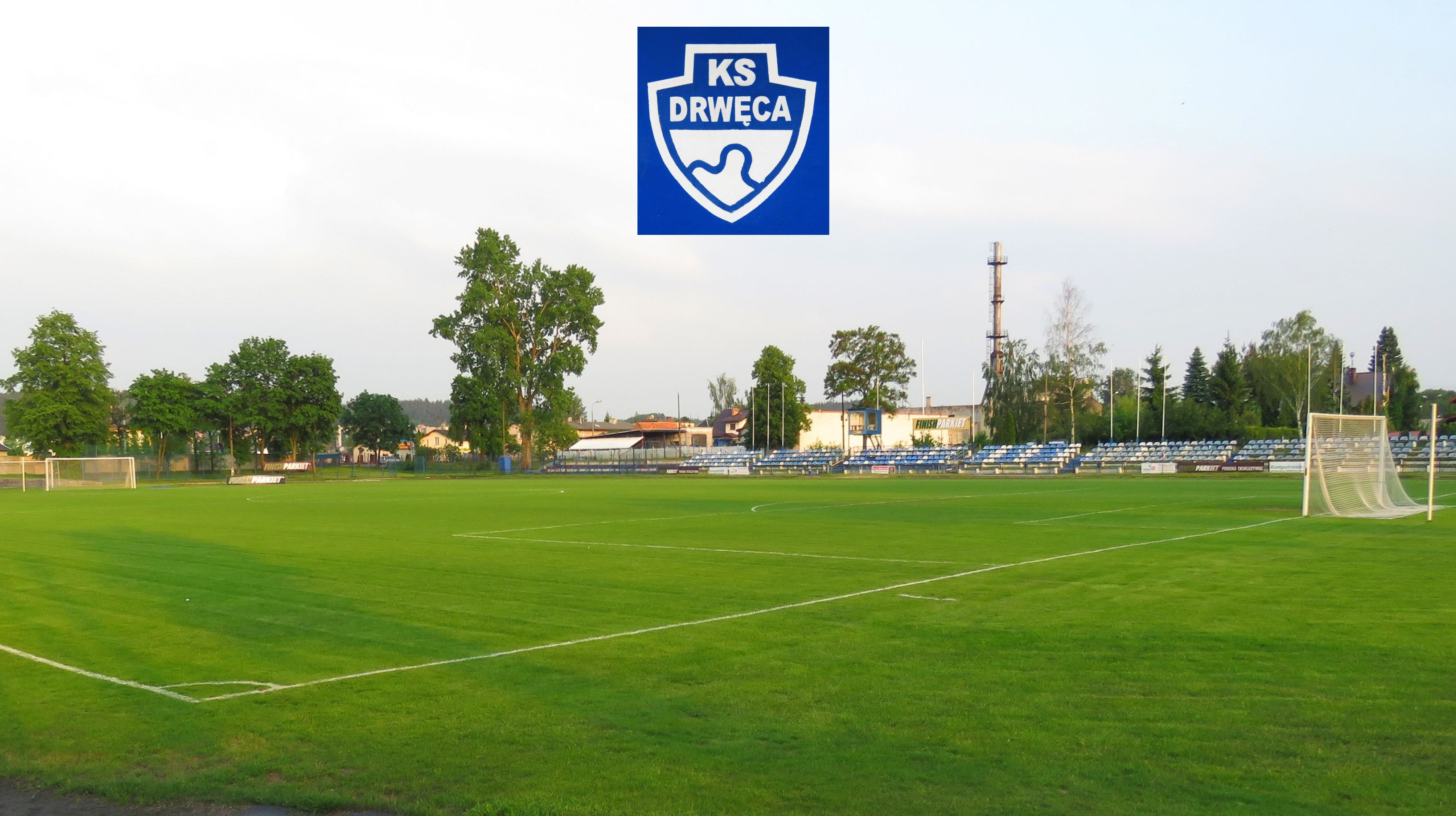 Klub Sportowy DRWĘCA Nowe Miasto Lubawskie